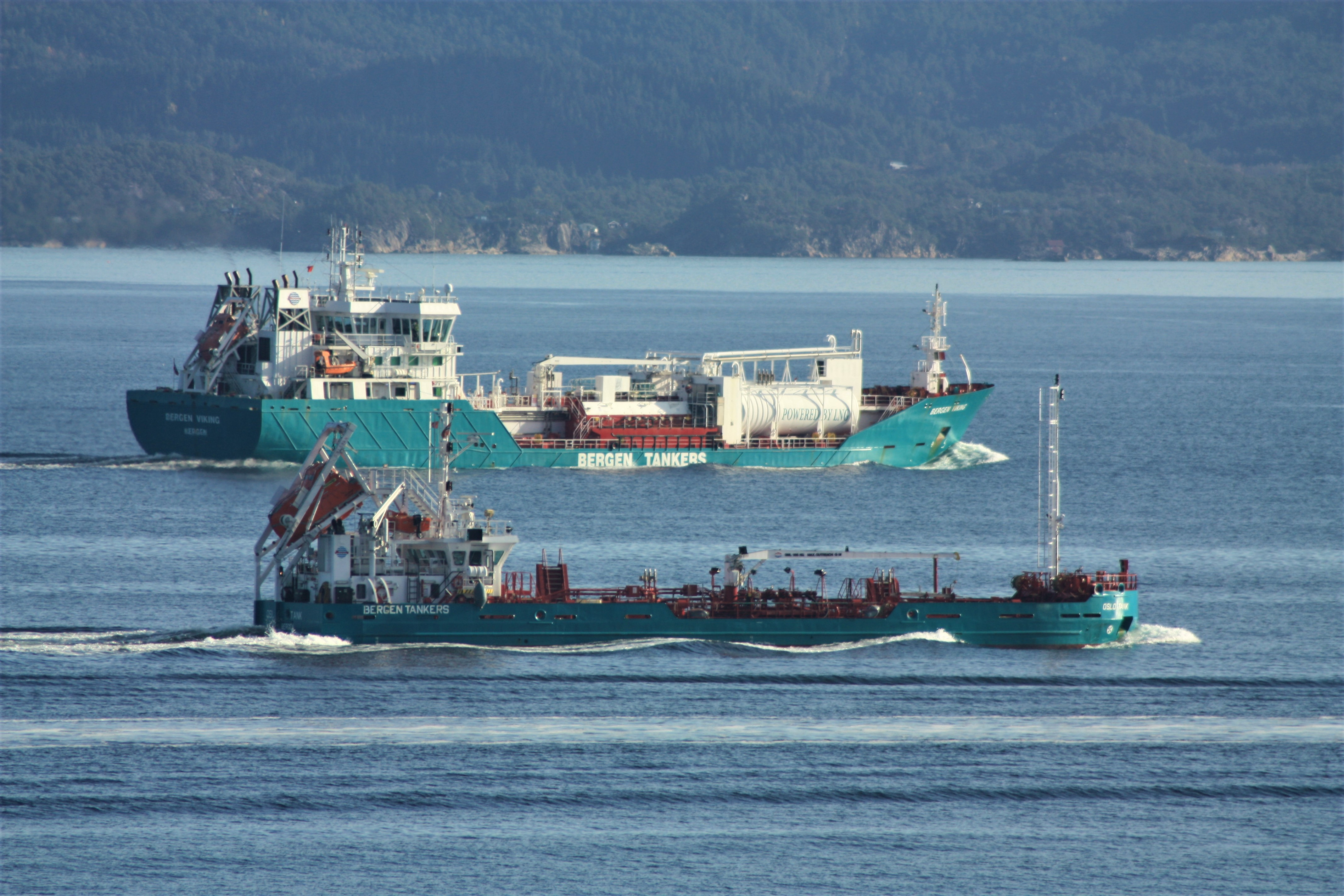 «Oslo Tank» og «Bergen Viking» i Korsfjorden